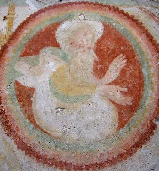 Convento dell'Annunciata di Medole. Padre benedicente attorniato da angeli musicanti. Affresco del XV secolo.